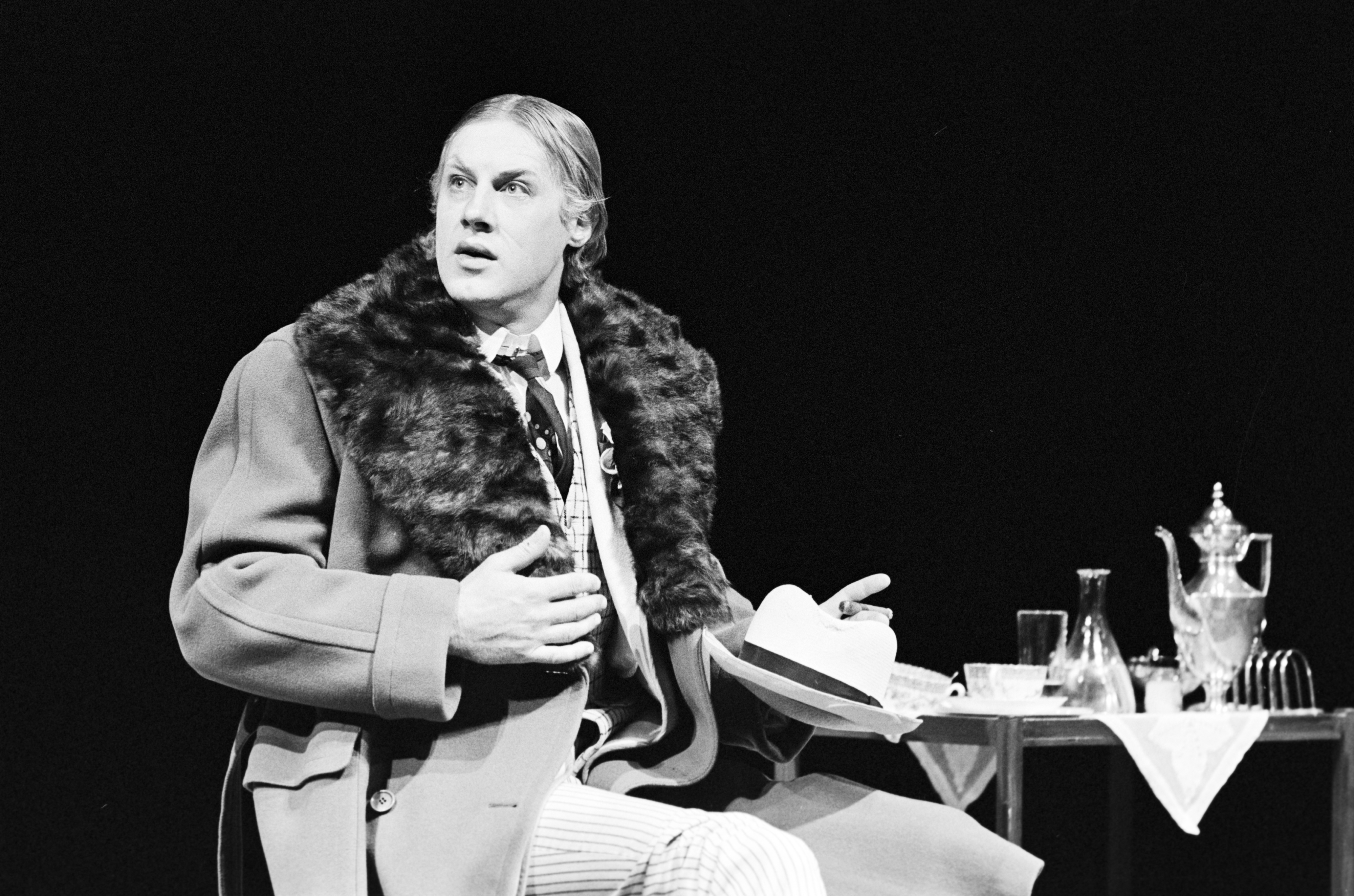 Scene fra Nationaltheaterets oppsetning av William Shakespeares "Helligtrekongersaften". Forestillingen hadde premiere 2. september 1976. Roland Joffé hadde regi og medvirkende var blant annet Anne Marit Jacobsen som Viola, Knut Husebø som Orsino og Tone Schwarzott som Olivia.